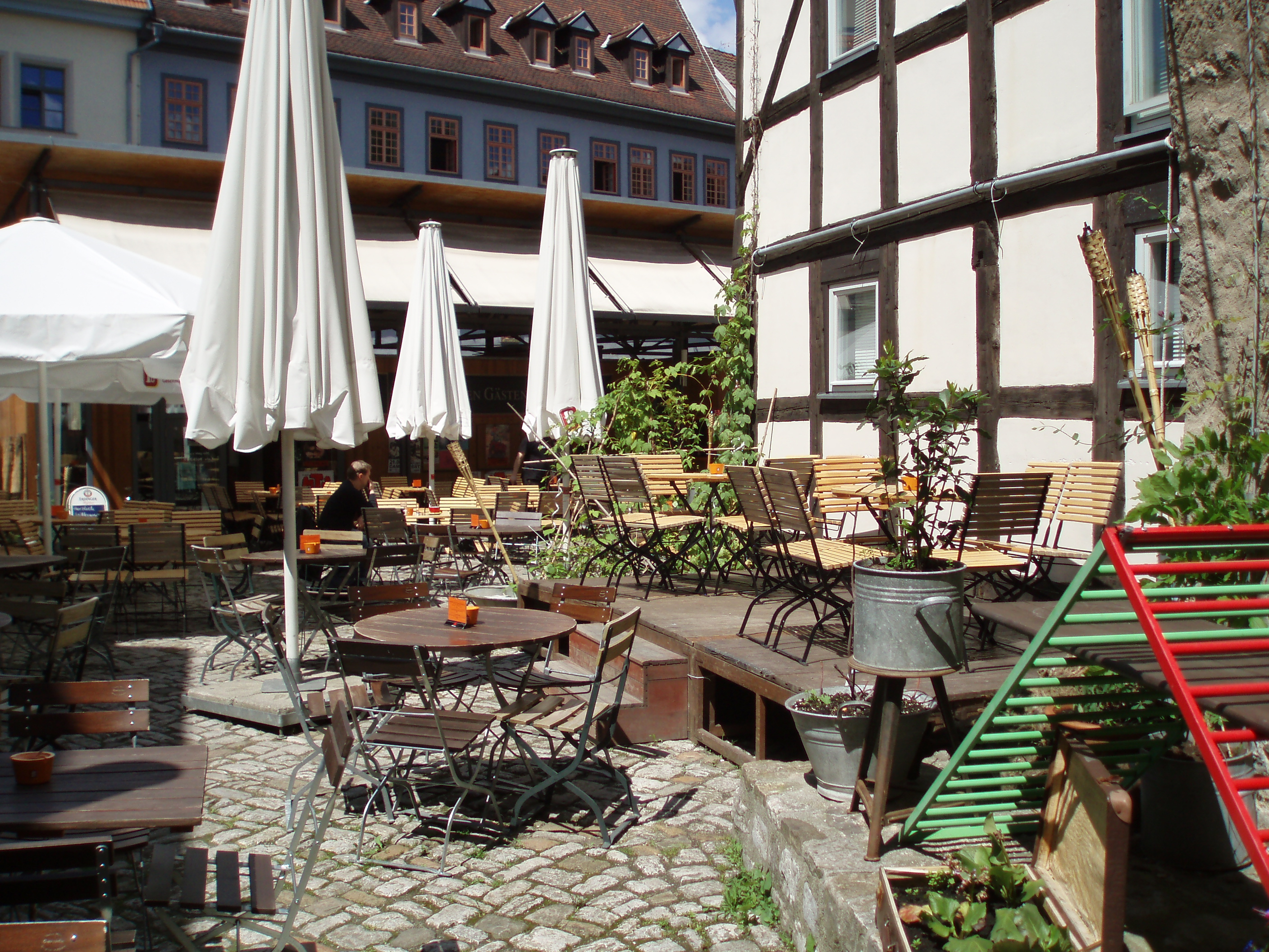 Engelsburg Erfurt, Hof mit Biergarten